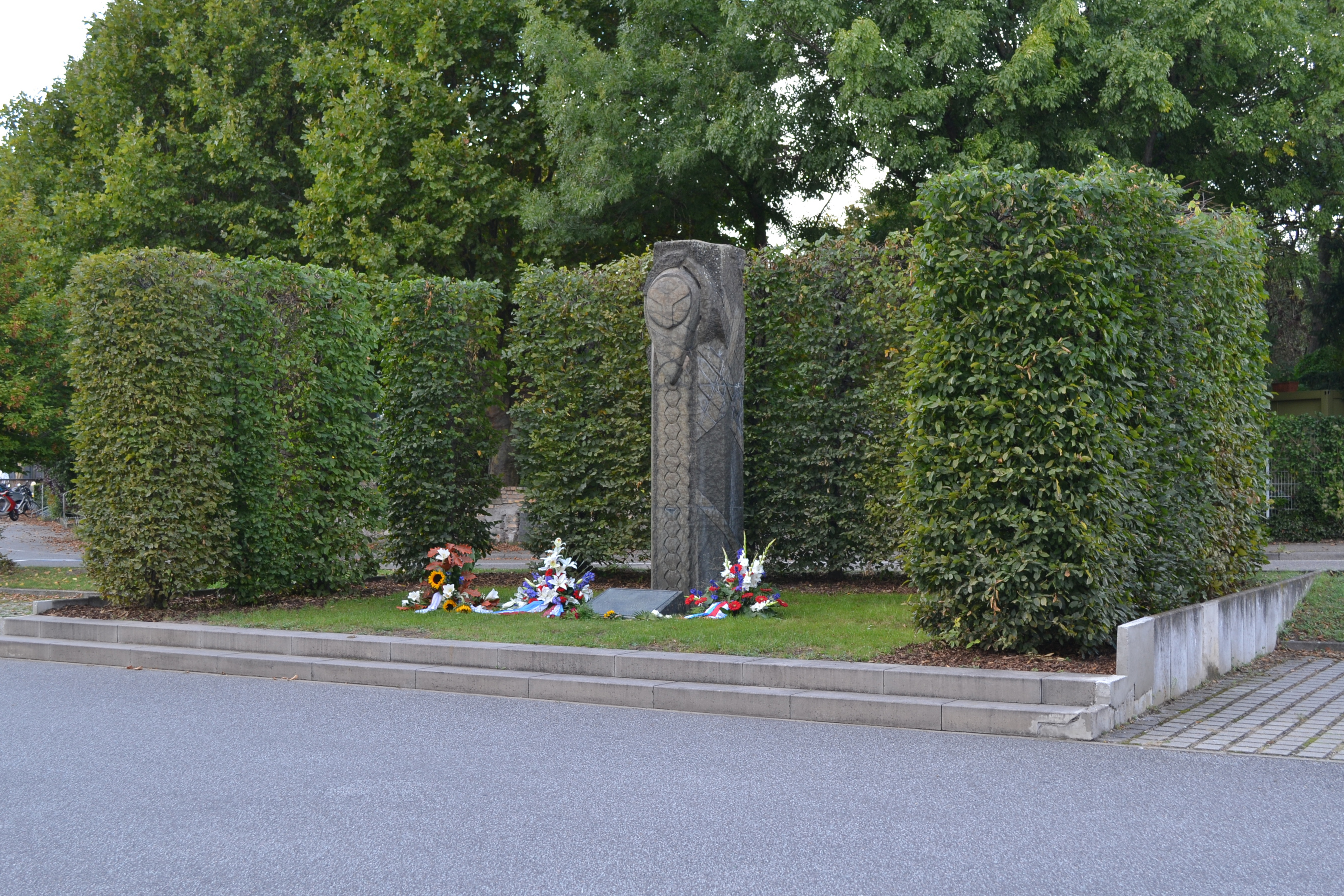 Denkmal zur Erinnerung an den Hubschrauberabsturz in Mannheim am 11. September 1982